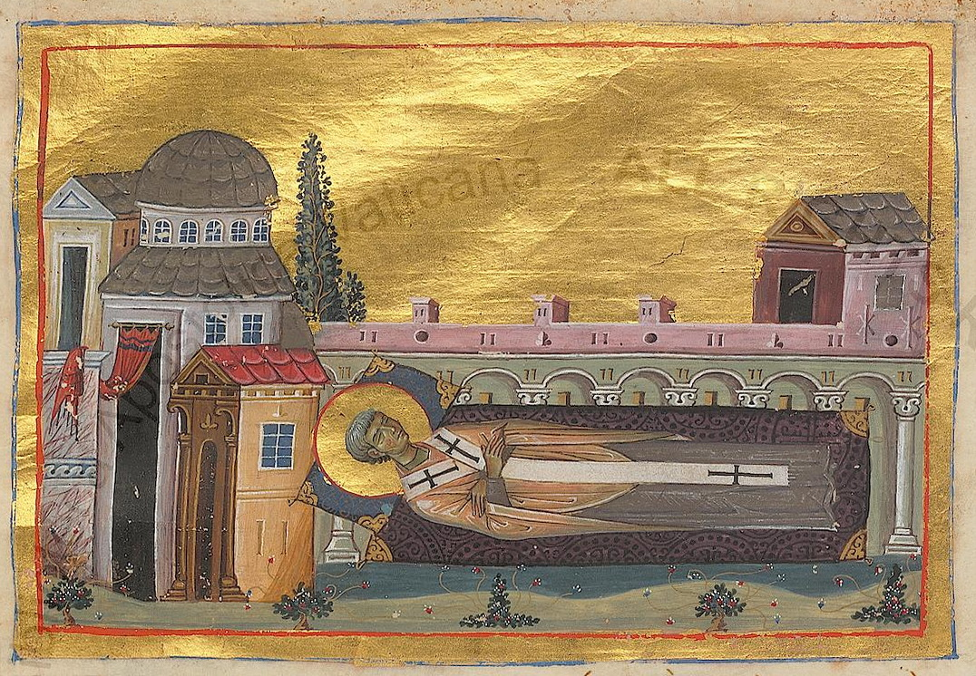 Игнатий Константинопольский Миниатюра Минология Василия II. Константинополь. 985 г. Ватиканская библиотека. Рим